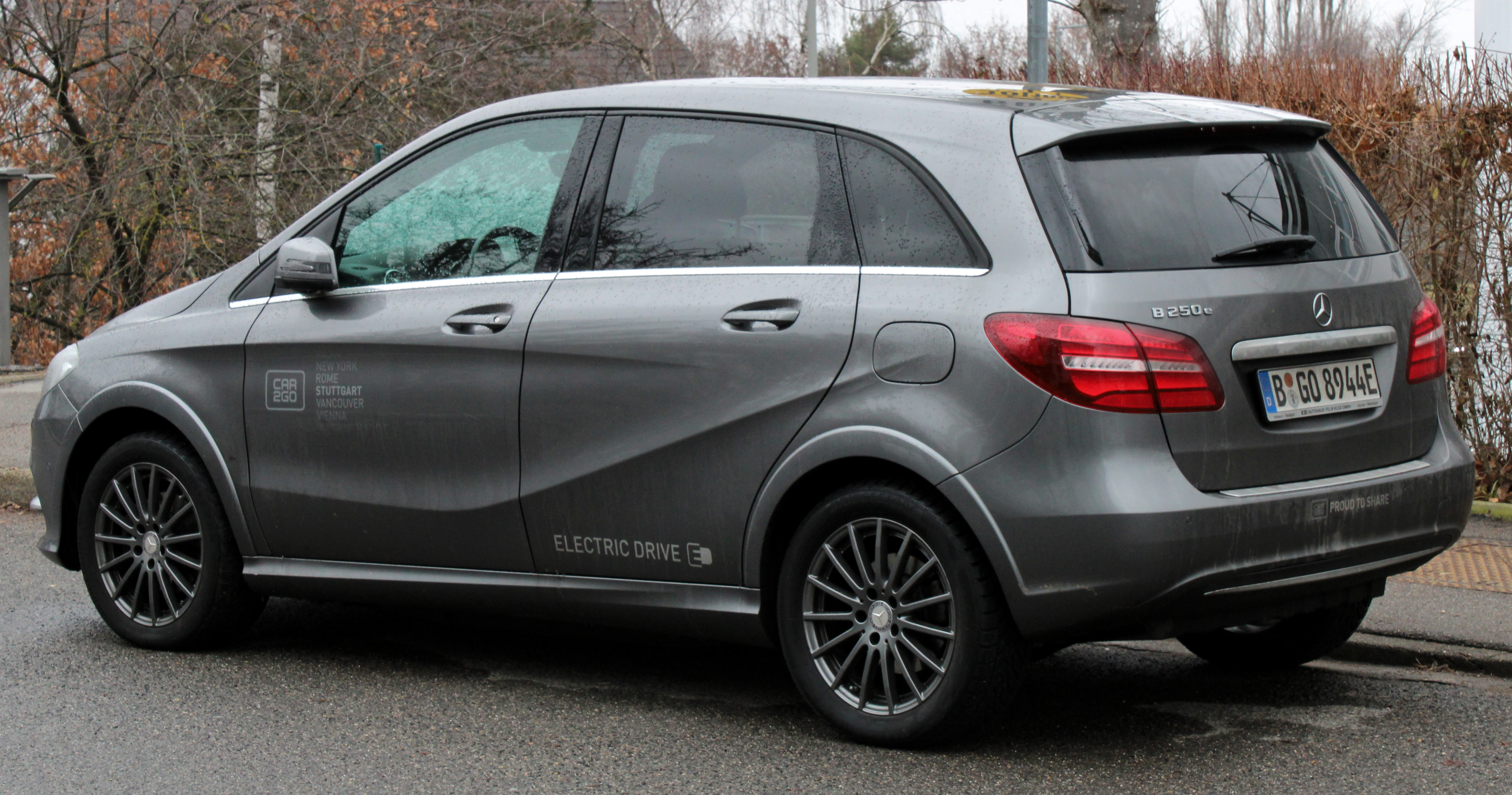 Car2go Mercedes-Benz B 250e in Stuttgart-Vaihingen